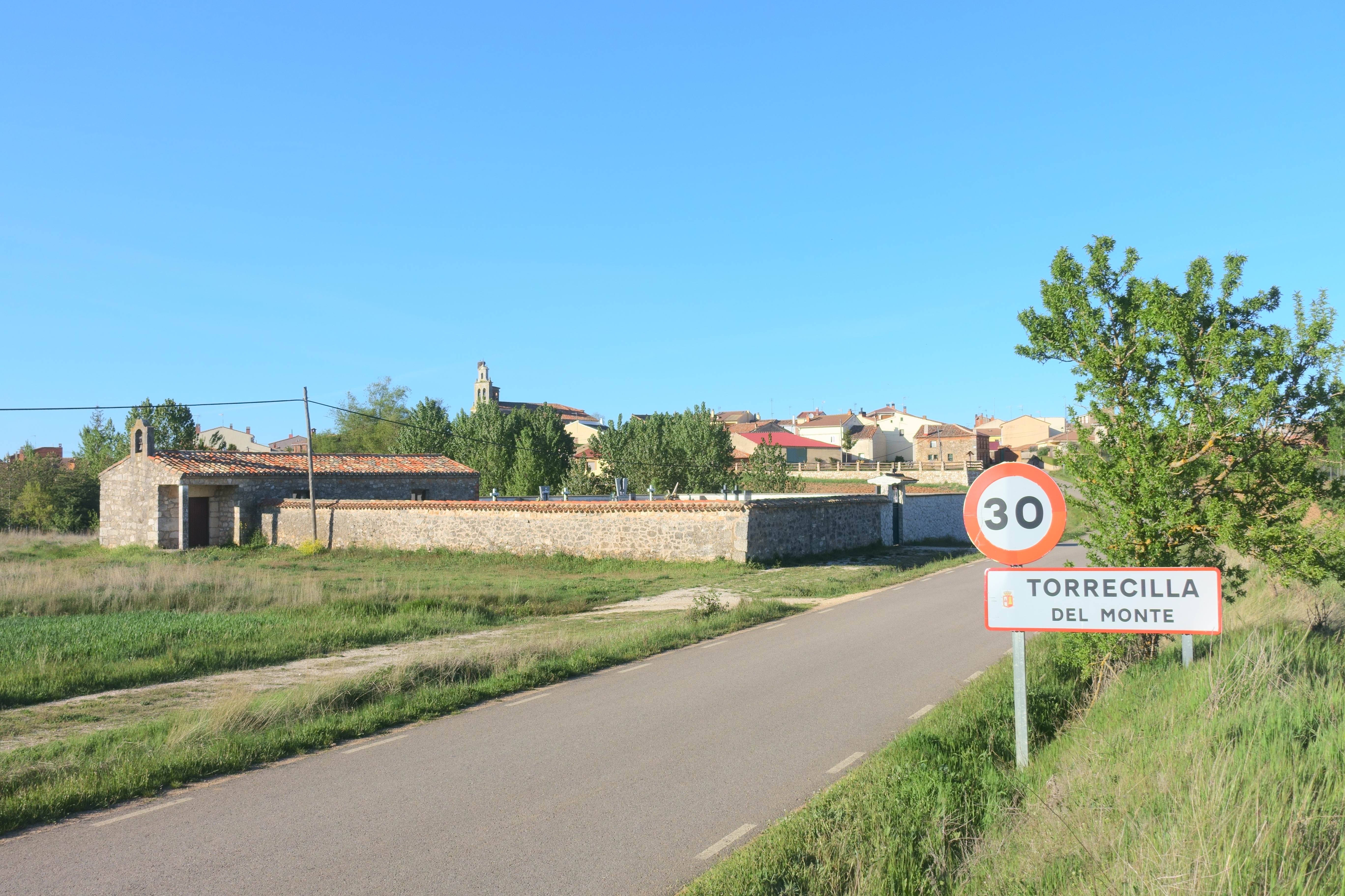 Vista general de Torrecilla del Monte (Burgos, España).